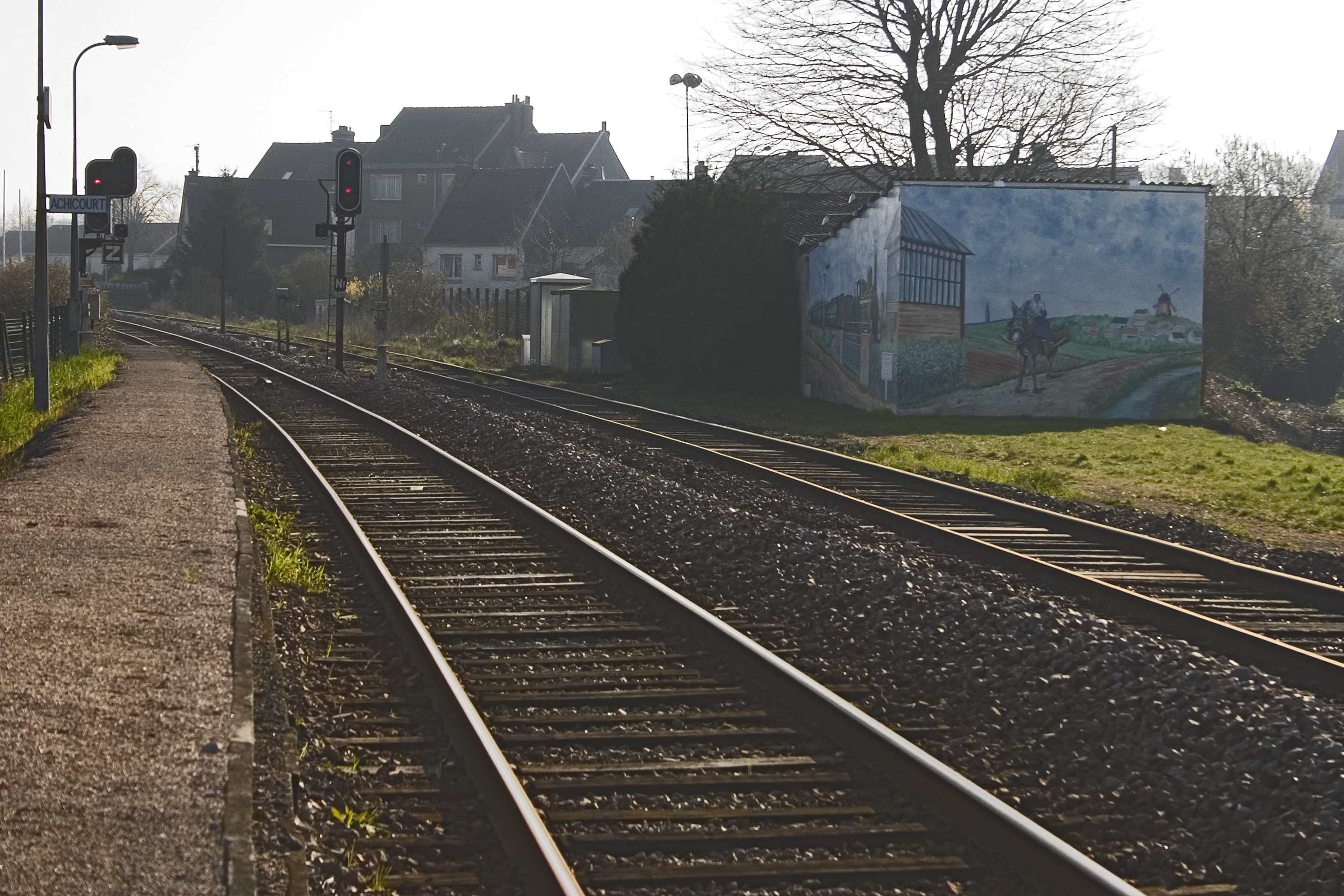 La station de chemin de fer d'Achicourt